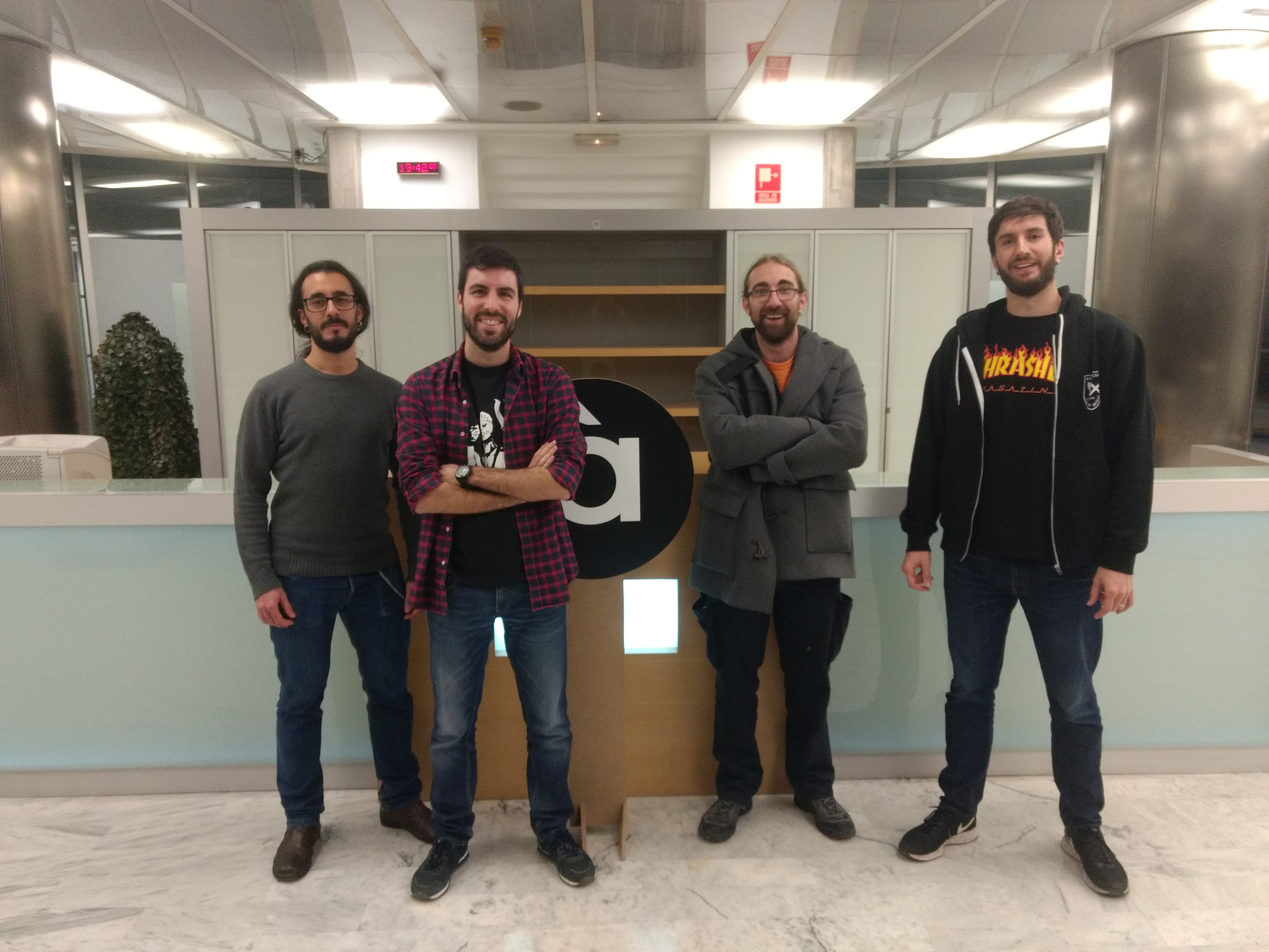 Joseto, Diego "Loof", Javier "Lechu" i Dani de VX.